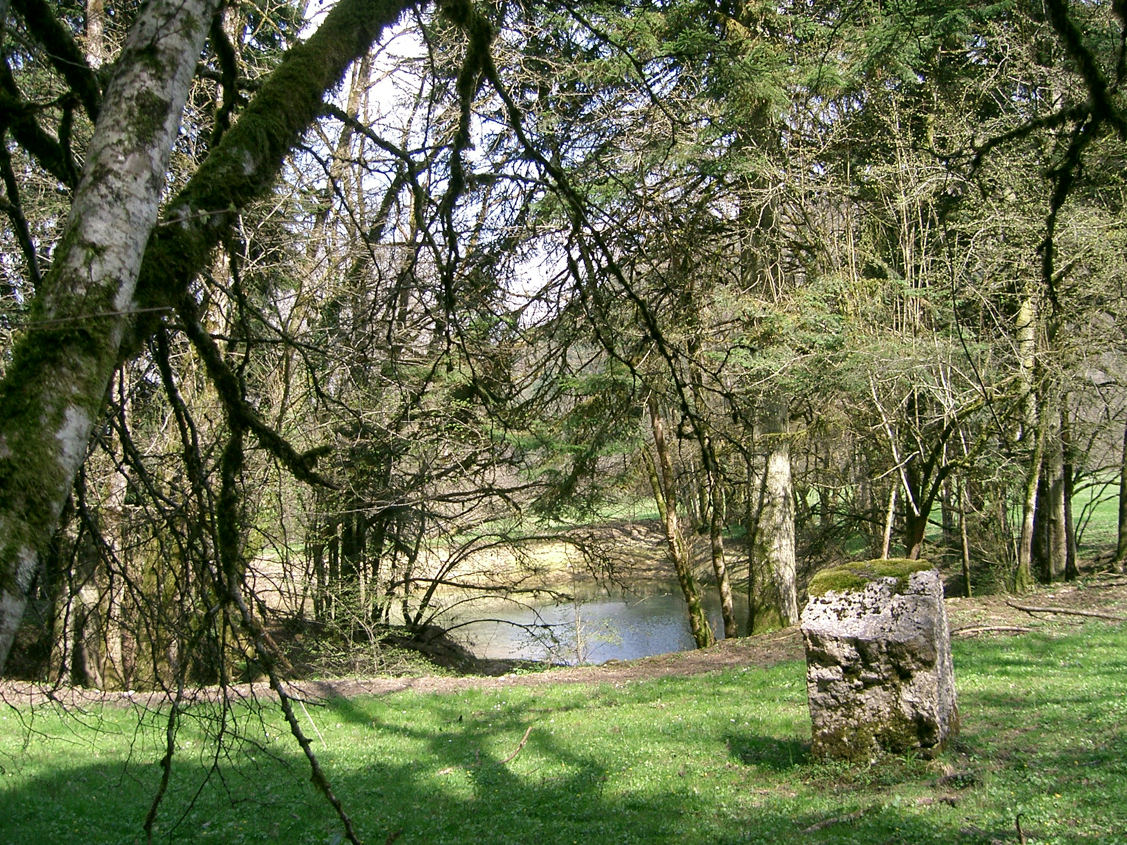 Source aménagée en abreuvoir par les moines de Balerne (Jura - France)